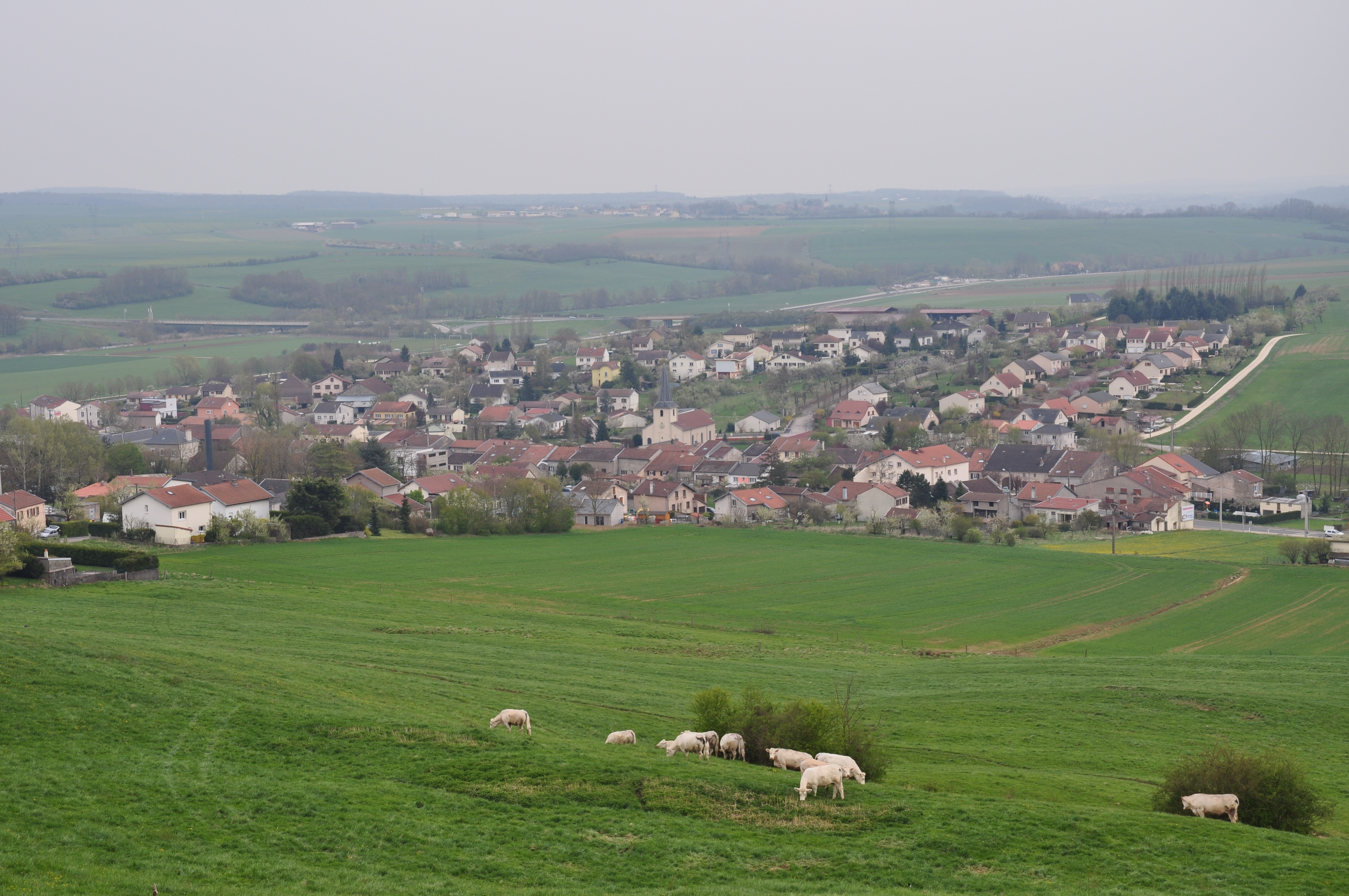 Le village de Bainville-sur-Madon en Meurthe-et-Moselle, vu depuis le plateau de Pont-Saint-Vincent